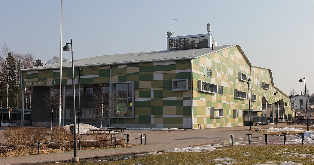 Kanniston koulu on Vantaan Kivistössä sijaitseva suomenkielinen alakoulu. Samassa koulurakennuksessa on myös Kanniston päiväkoti, Kanniston nuoriso- ja asukastila Kannu sekäkouluterveydenhoidon tiloja. Koulurakennus valmnistui vuonna 2011. Kesällä 2014 rakennuksessa suoritettiin sisäilmanongelmia helpottaneita korjauksia.